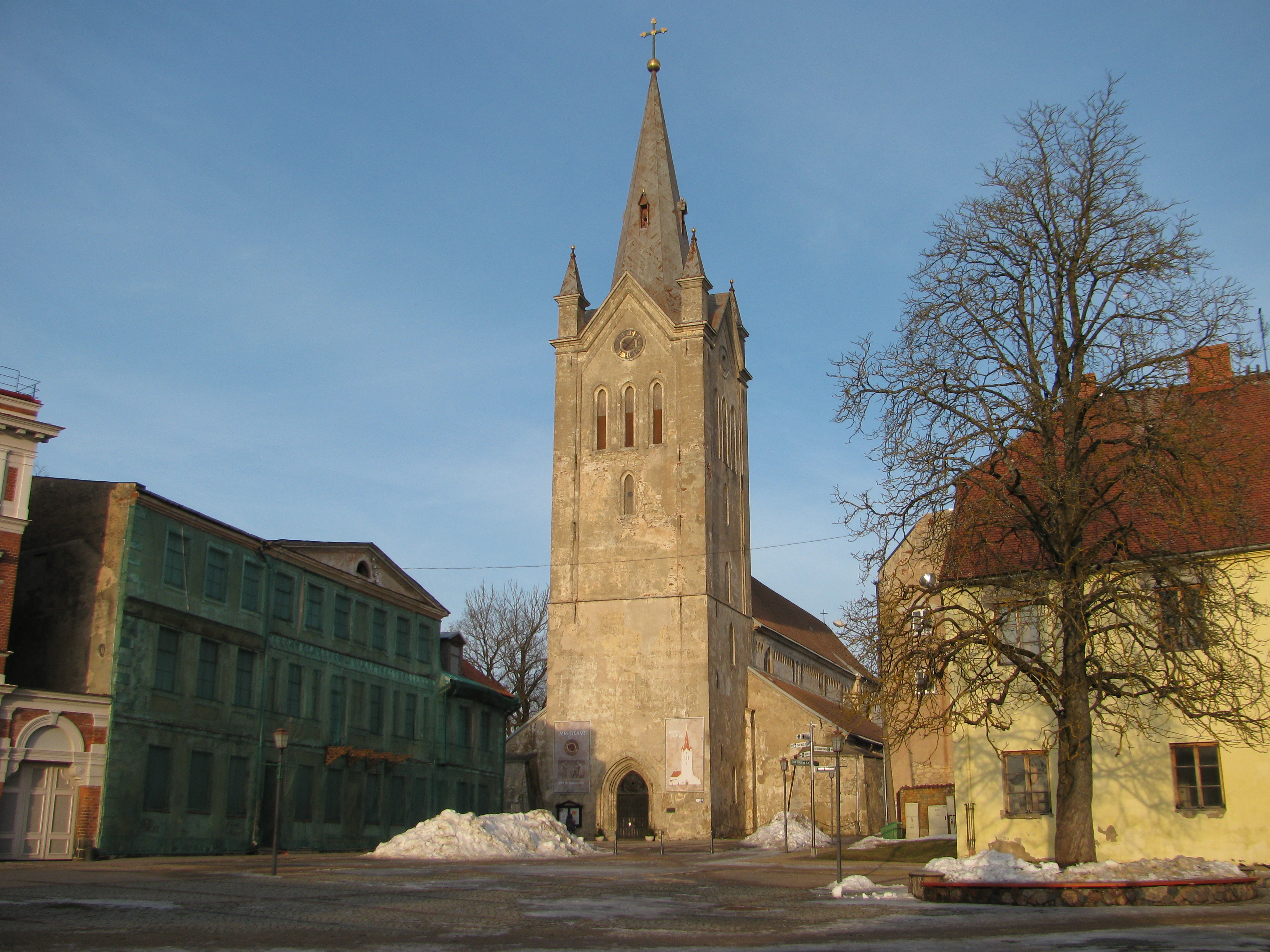 Sv.Jāņa luterāņu baznīca, Cēsis, Lielā Skolas iela 8